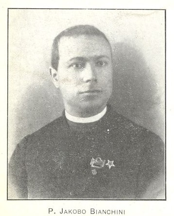 Foto de Pastro Giacomo Bianchini sur bildkarto uzita de li en 1916.